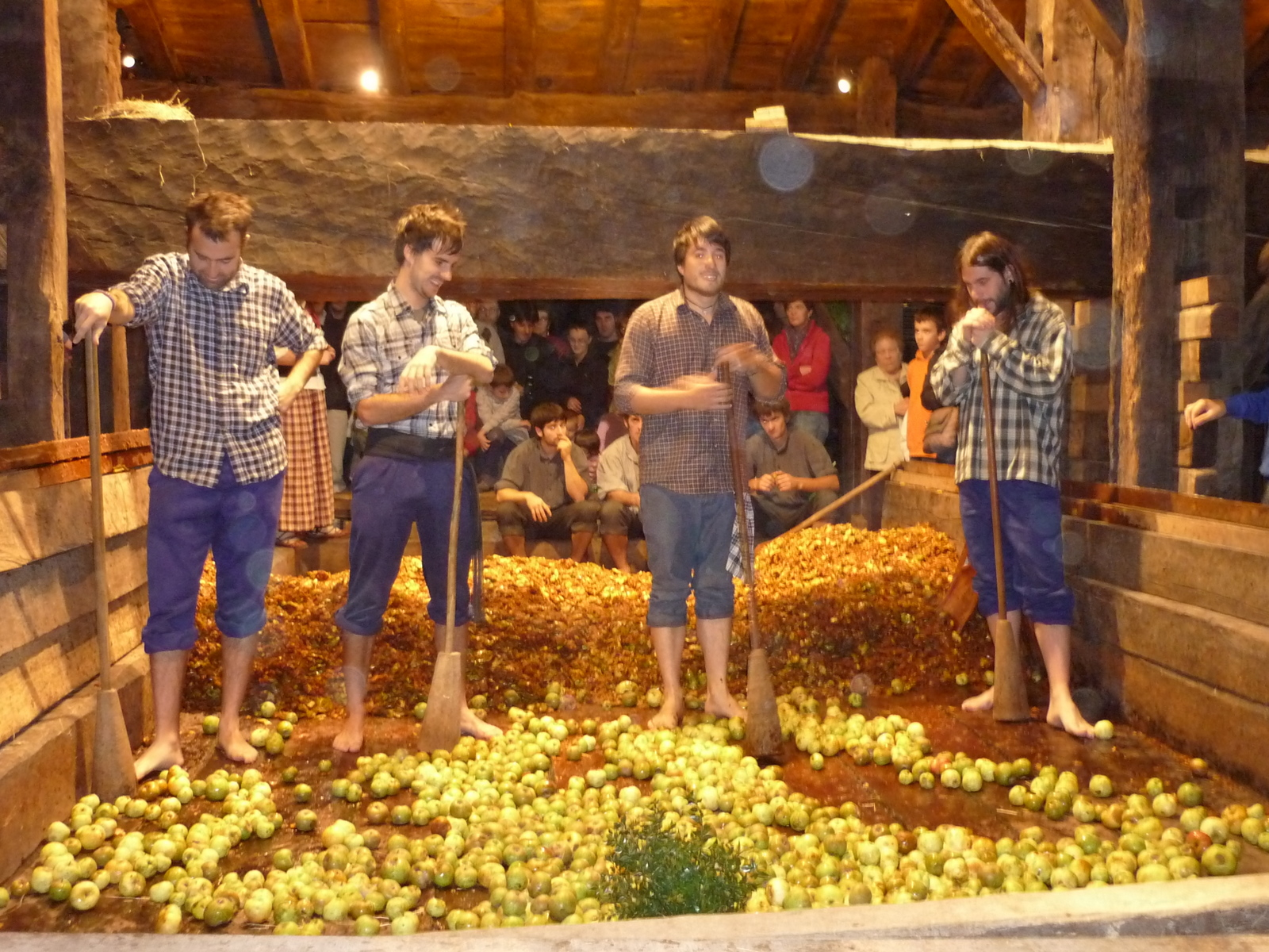 Kirikoketa: sagardorako sagar zanpaketa. Igartubeiti, Ezkio-Itsaso. Gipuzkoa, Euskal Herria. Kirikoketa: apple press to made cider. Igartubeiti farm, Ezkio-Itsaso. Gipuzkoa, Basque Country.